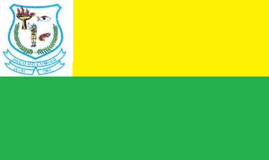 Bandeira de Paço do Lumiar, município do Maranhão, Brasil.